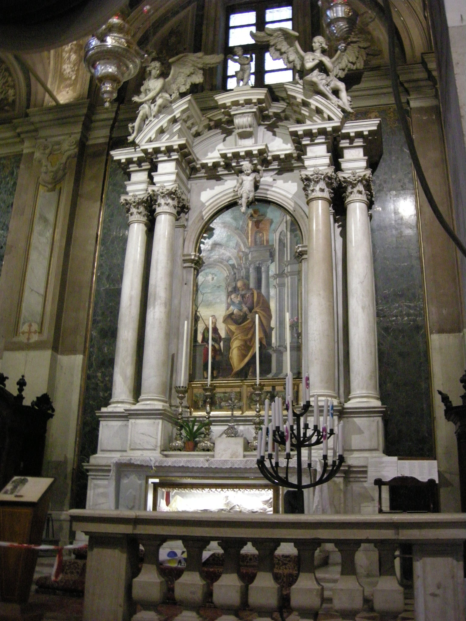 Duomo di udine, altare di san giuseppe, tela di pellegrino da san daniele